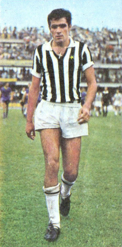 Verona, stadio Marcantonio Bentegodi, 30 agosto 1970. Il calciatore italiano Antonello Cuccureddu alla Juventus, in occasione della trasferta sul campo del Verona (1-1) valevole per il primo turno della Coppa Italia 1970-71.